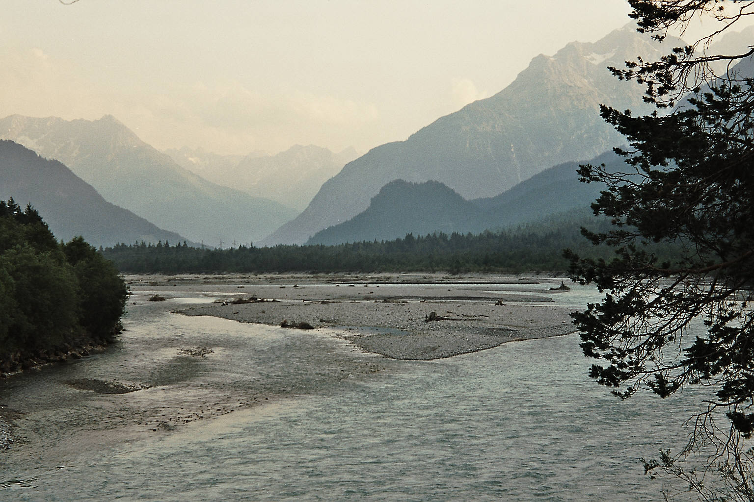 Lechtal bei Forchach